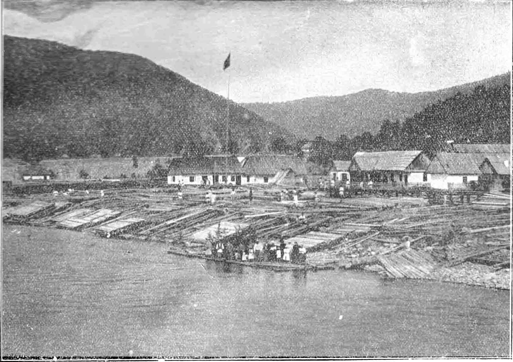 Schela Aţa (afluent al Tarcăului) de pe Domeniul Coroanei Bicaz